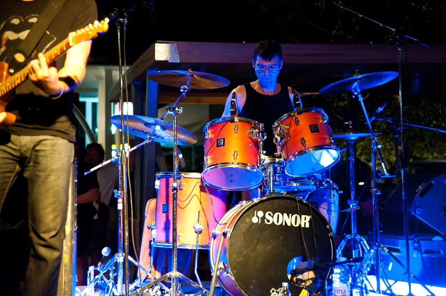 Davor Gobac i Psihomodo pop